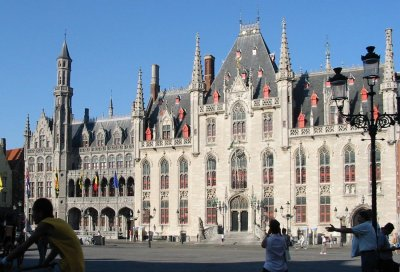 Brugge, Grote Markt, juli 2003, foto gemaakt en ter beschikking gesteld voor vrij gebruik door Gebruiker:Ellywa Categorie:Afbeelding Brugge